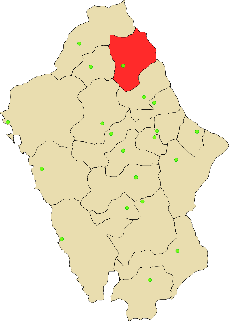 Provincia de Sihuas de departamento Ancash